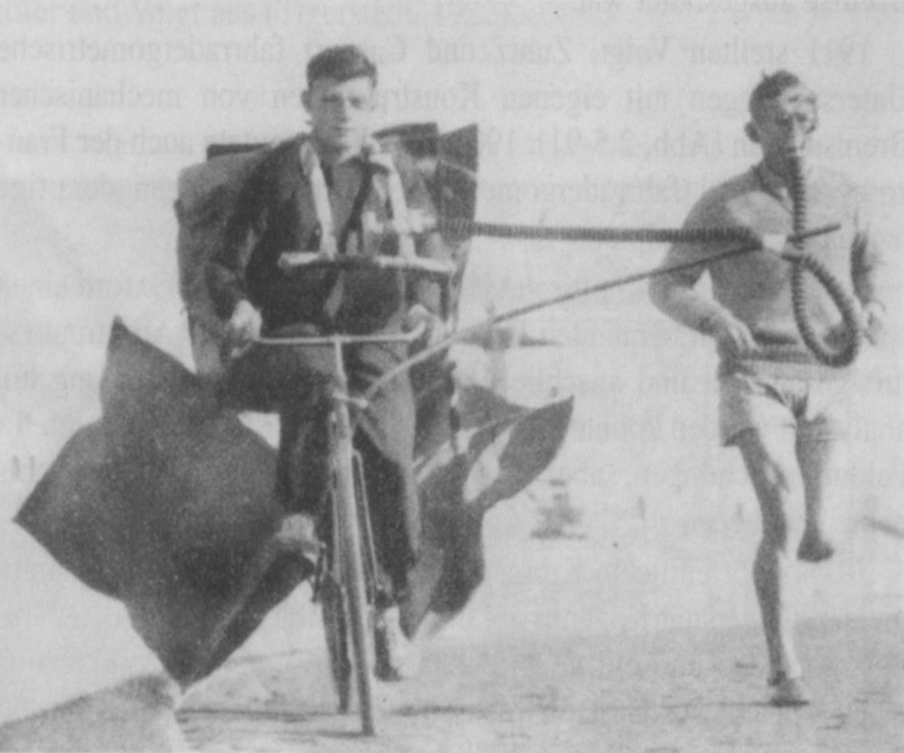 Gasstoffwechseluntersuchung während des Laufens unter Benutzung des Douglas-Sackes, durchgeführt von Kost 1928 in Berlin